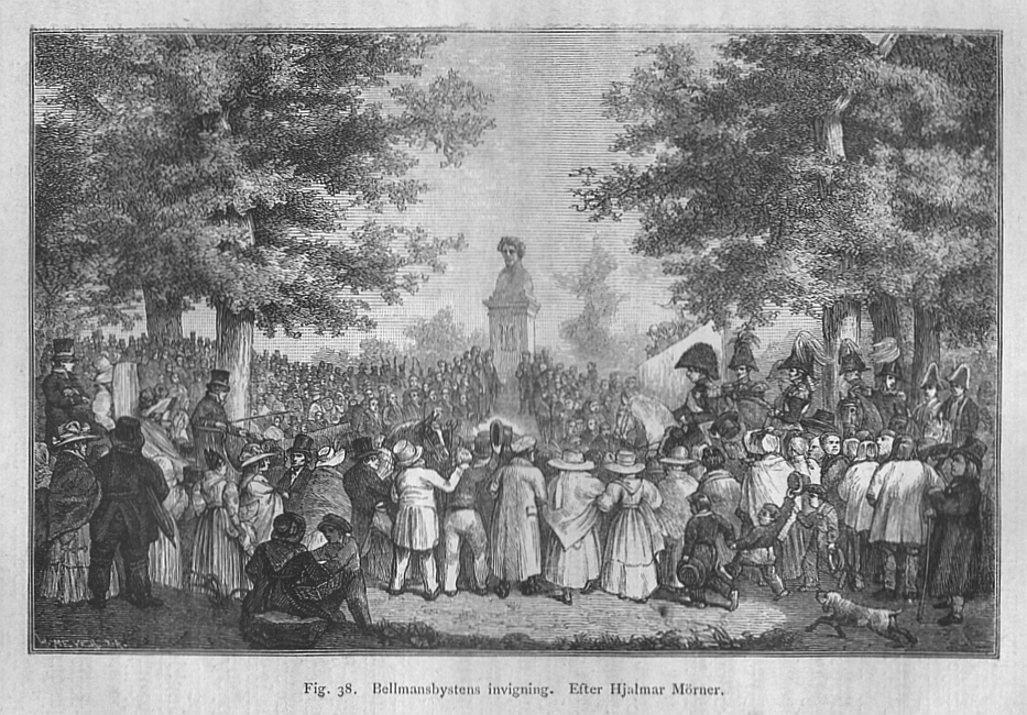 Invigning av Bellmansbysten vid Bellmansro på Djurgården, Stockholm. Juni 1829.